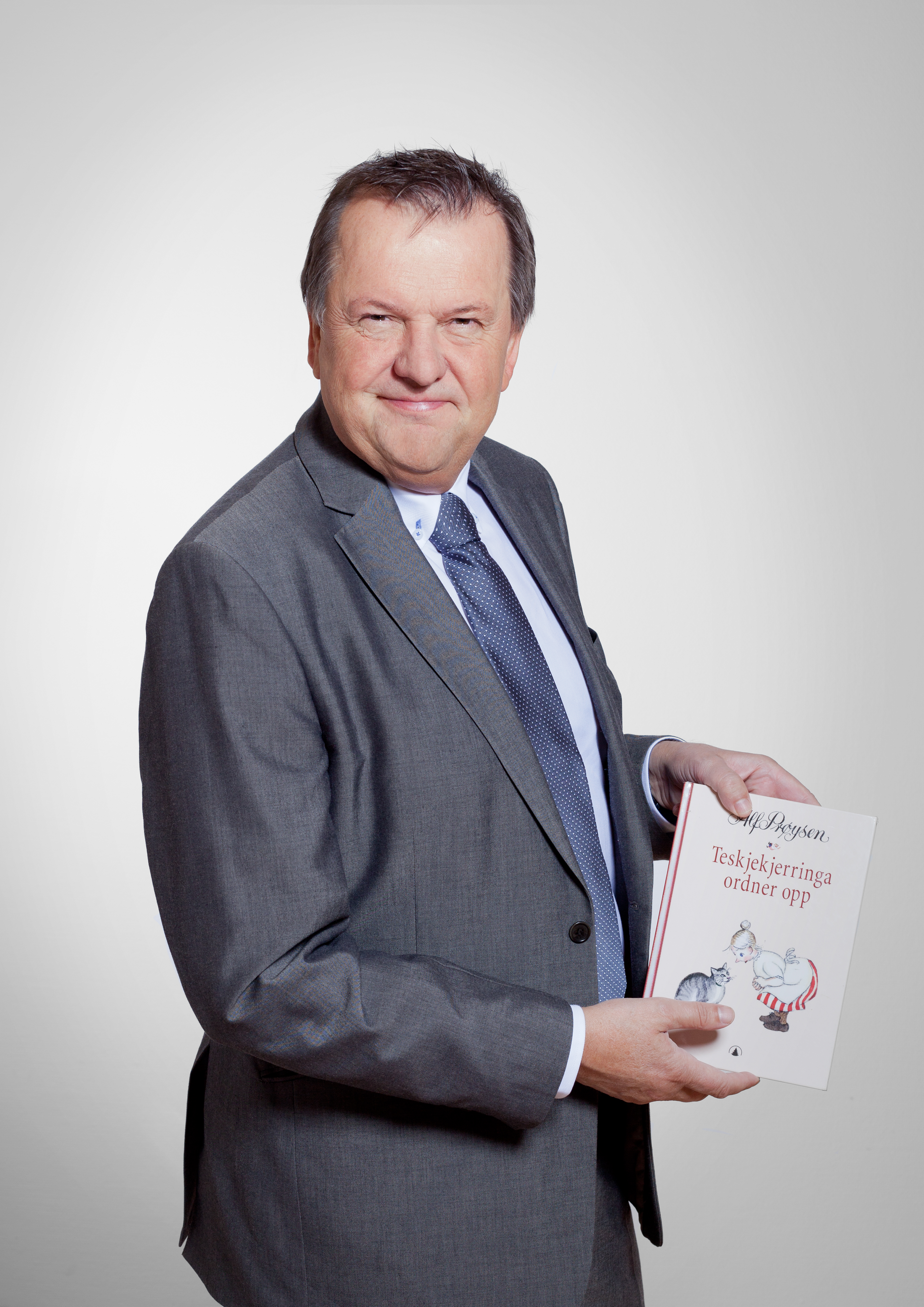 Fylkesmann Inge Ryan, Nord-Trøndelag. Bildet er tatt i forbindelse med Nord-Trøndelag fylkesbiblioteks kampanje "Leseambassadører"